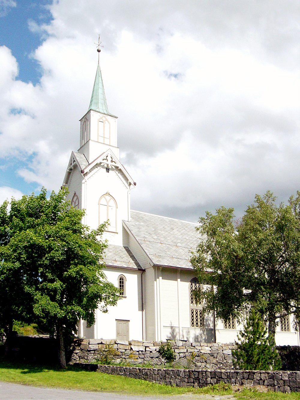 Ørskog and the Ørskog kirke